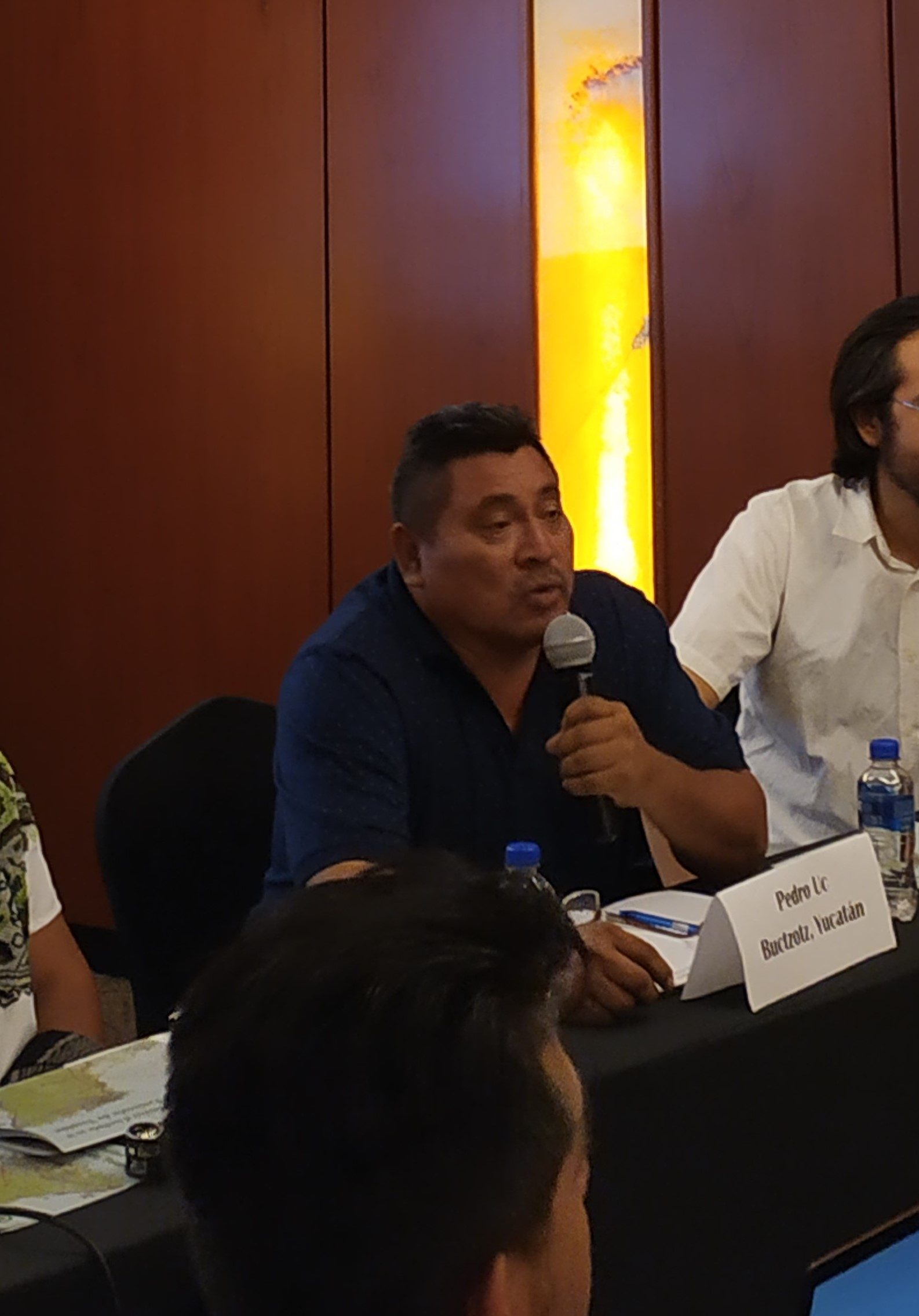 El escritor maya Pedro Uc Be en conferencia por la defensa del territorio.